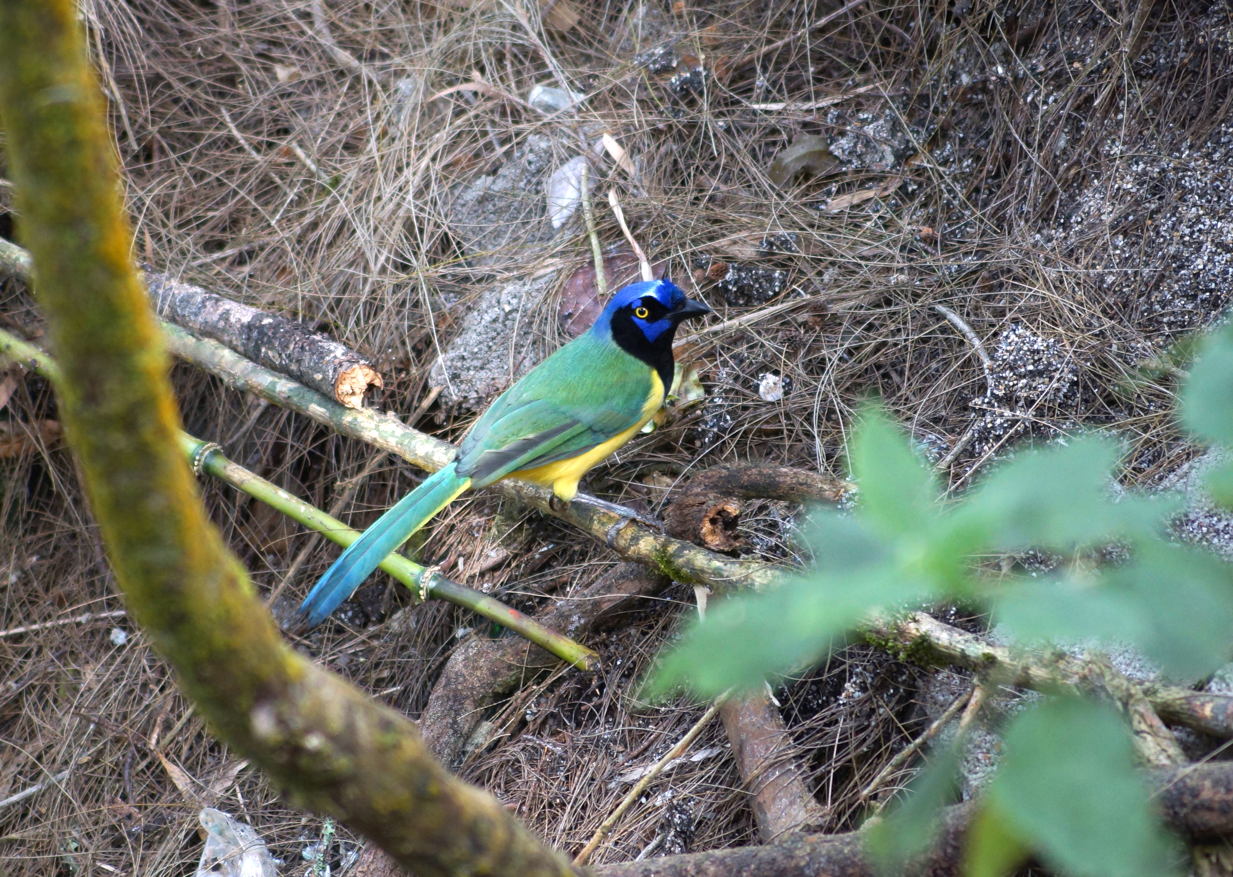 El Parque Nacional Waraira Repano (Caracas, Venezuela) es un excelente lugar para la observación de coloridas y hermosas aves